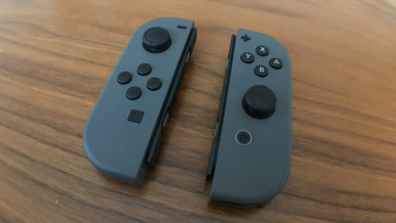 Une paire de Joy-con grise